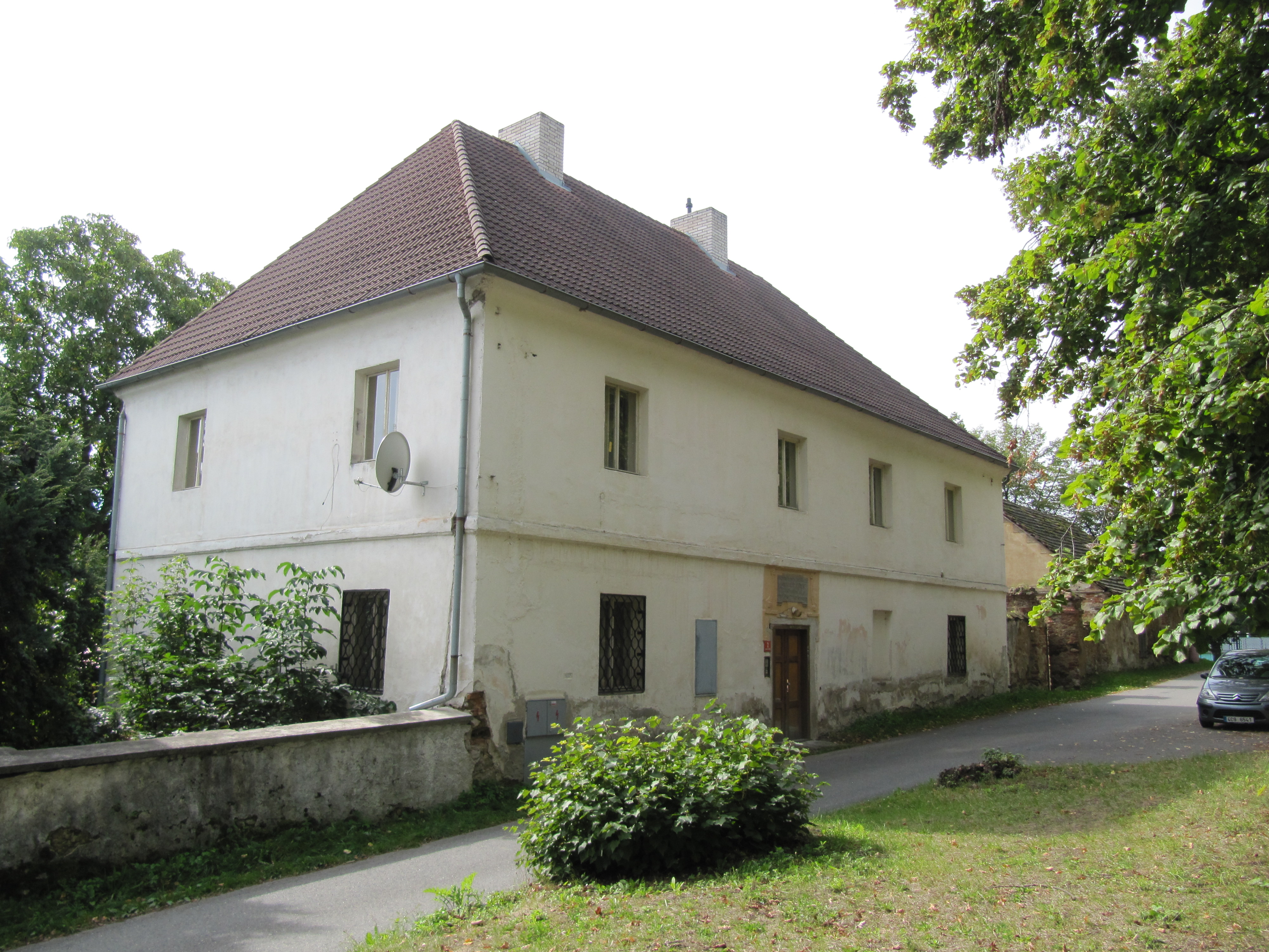 Fara (Chotoviny), Chotoviny 2